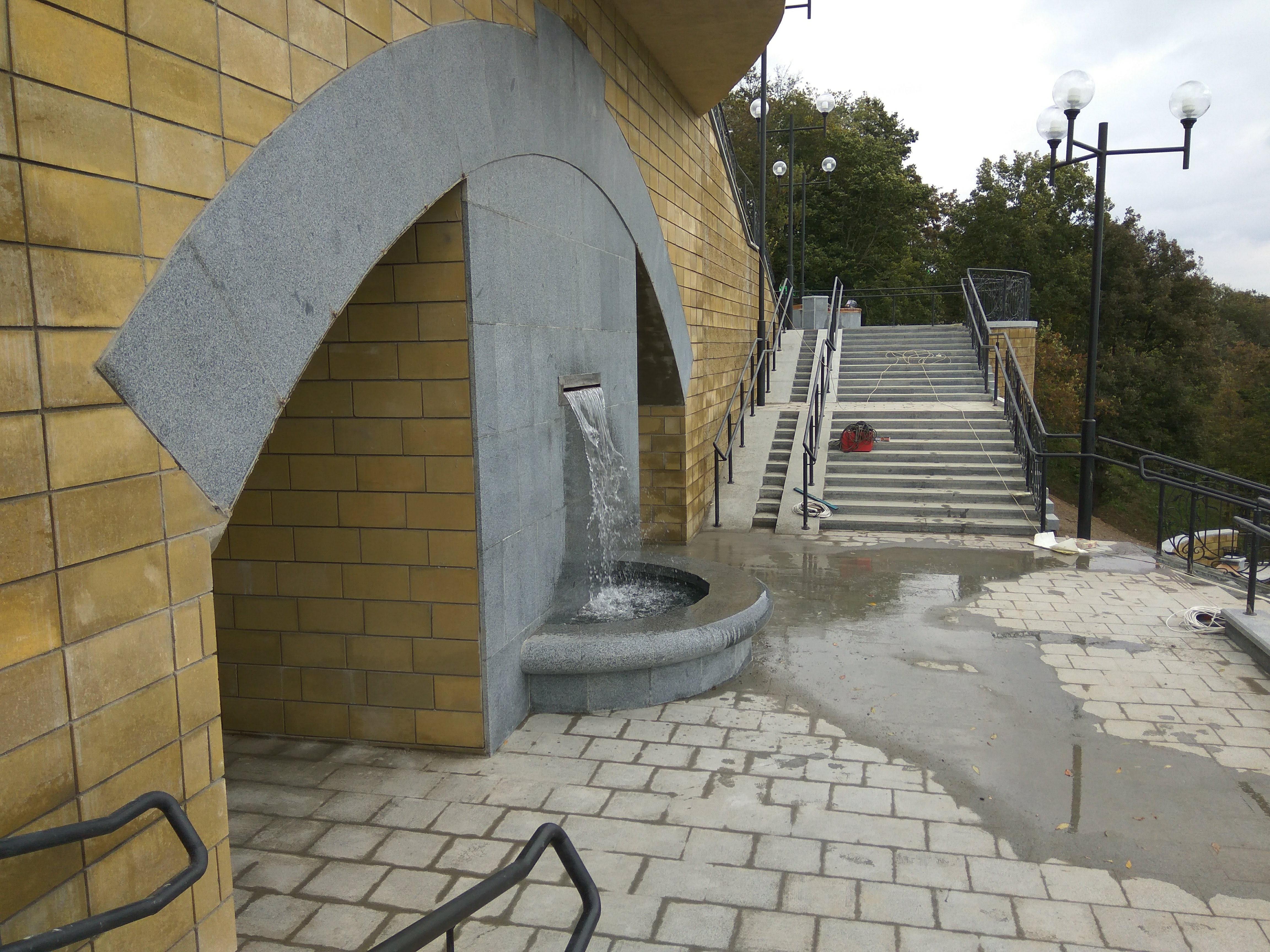 Магілёў. Лесвіца ў Падміколле